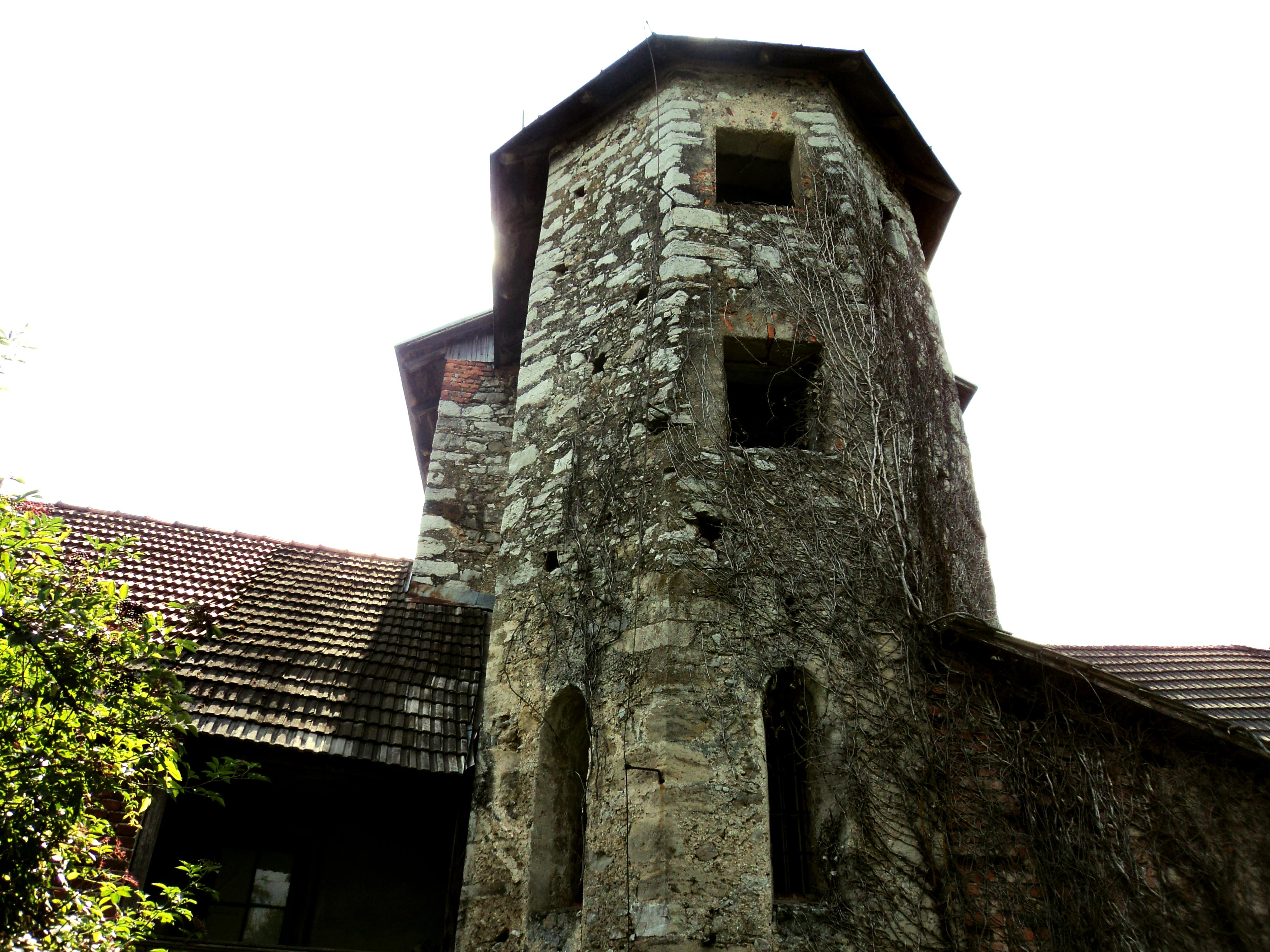 Grad Vinica 2010